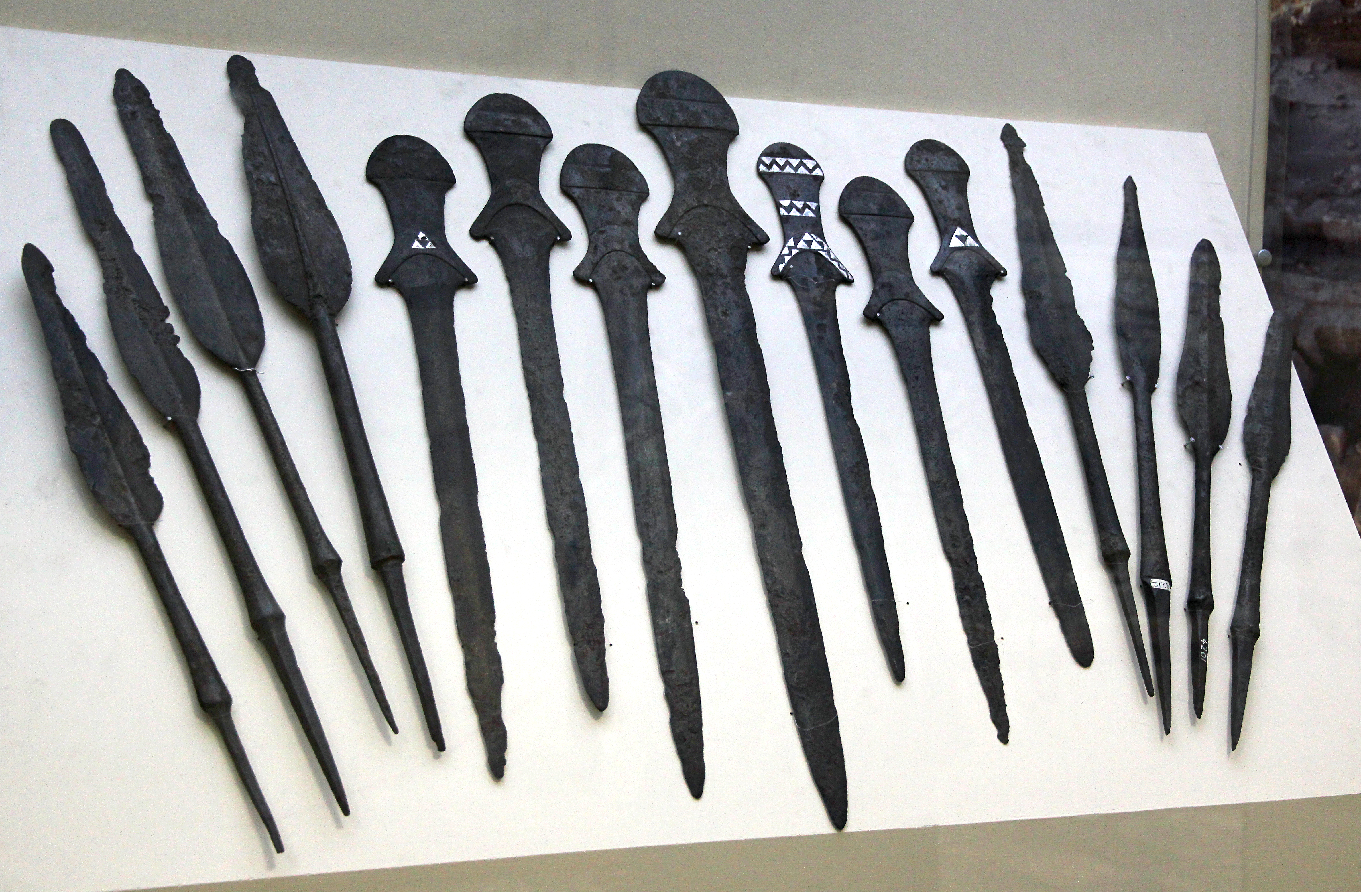 Schwerter aus Arsenbronze aus Arslantepe im Archäologischen Museum Malatya (3000 v. Chr.)